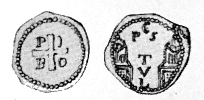 monnaie frappée sous pibon avec une représentaion de la cathédrale, lors de l'exposition.